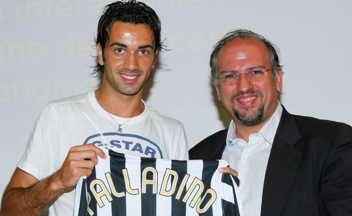 Raffaele Palladino